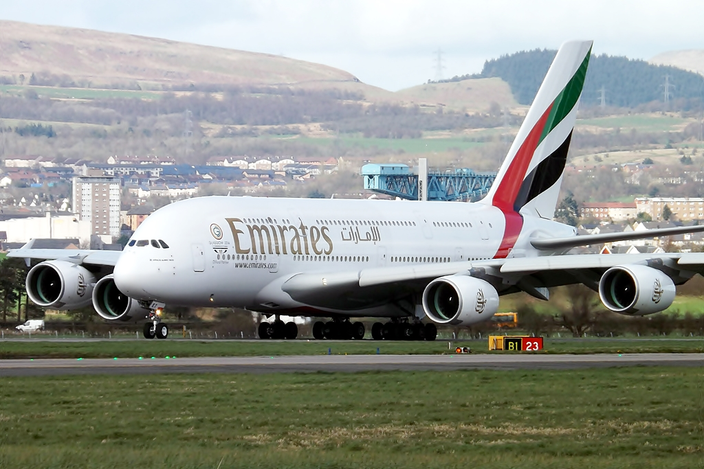 A6-EET A380 Emirates